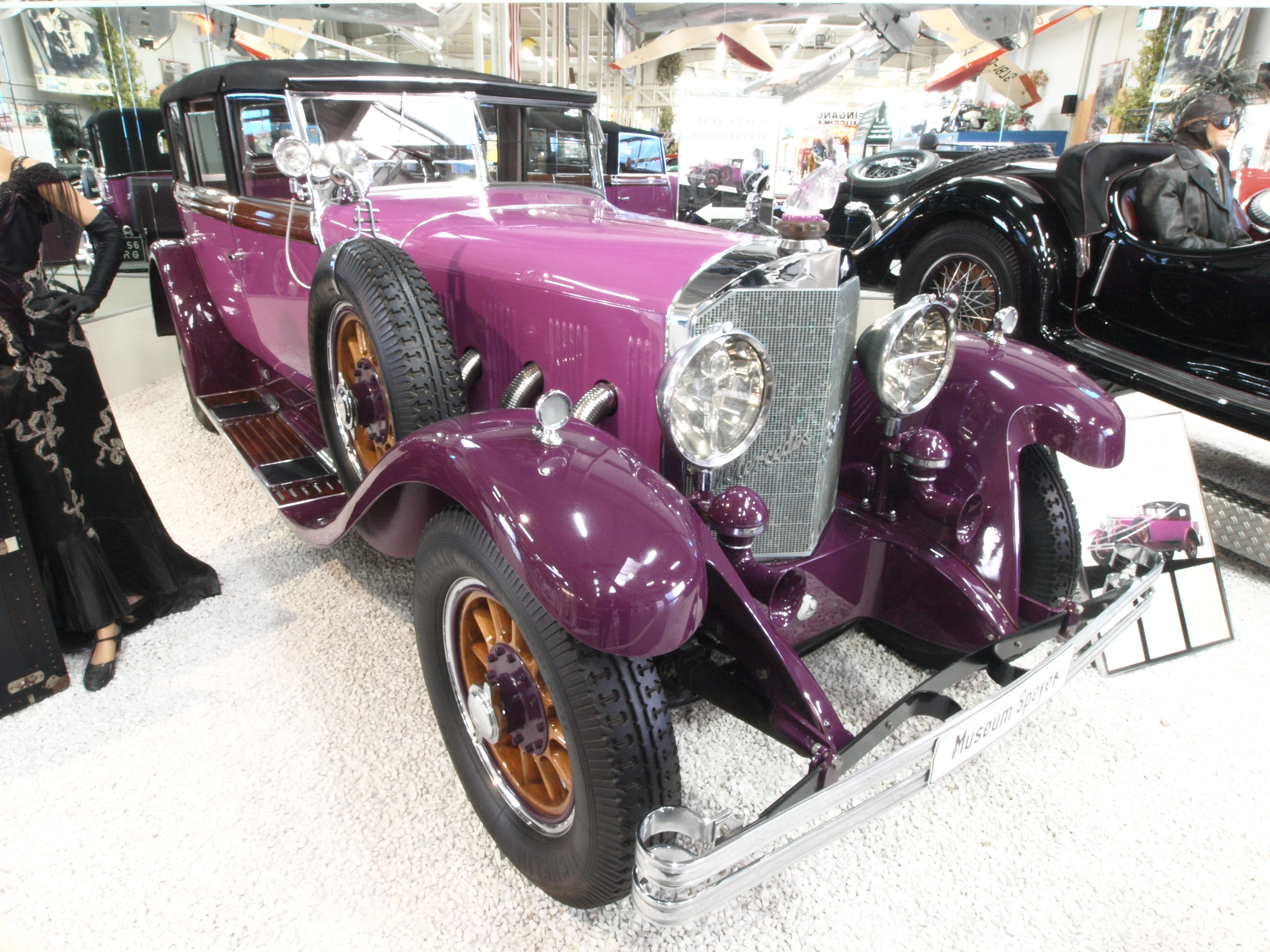 1928 Mercedes-Benz 24/100/140hp Cabriolet Saoutchik